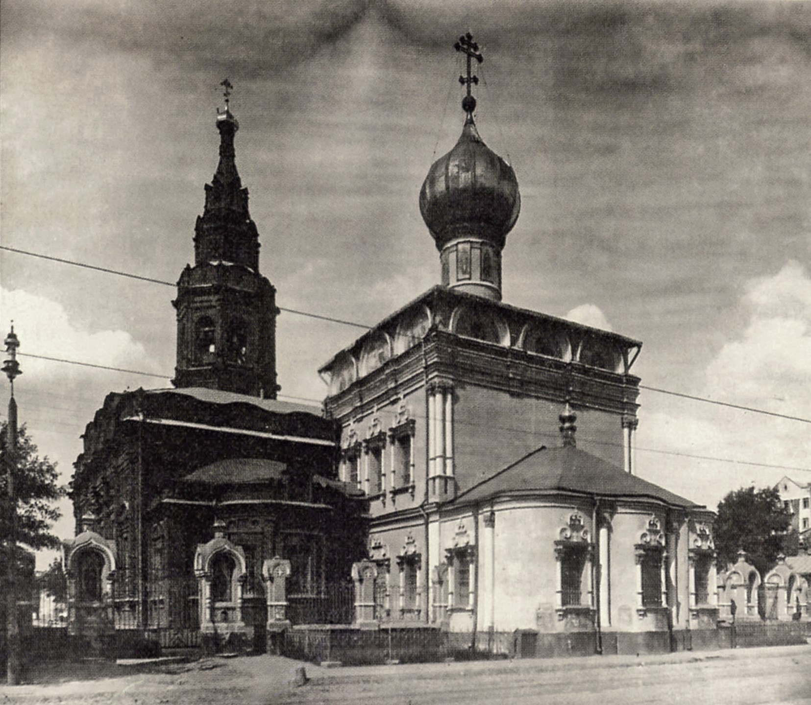 Церковь Николая Чудотворца в Новой Слободе после перестройки